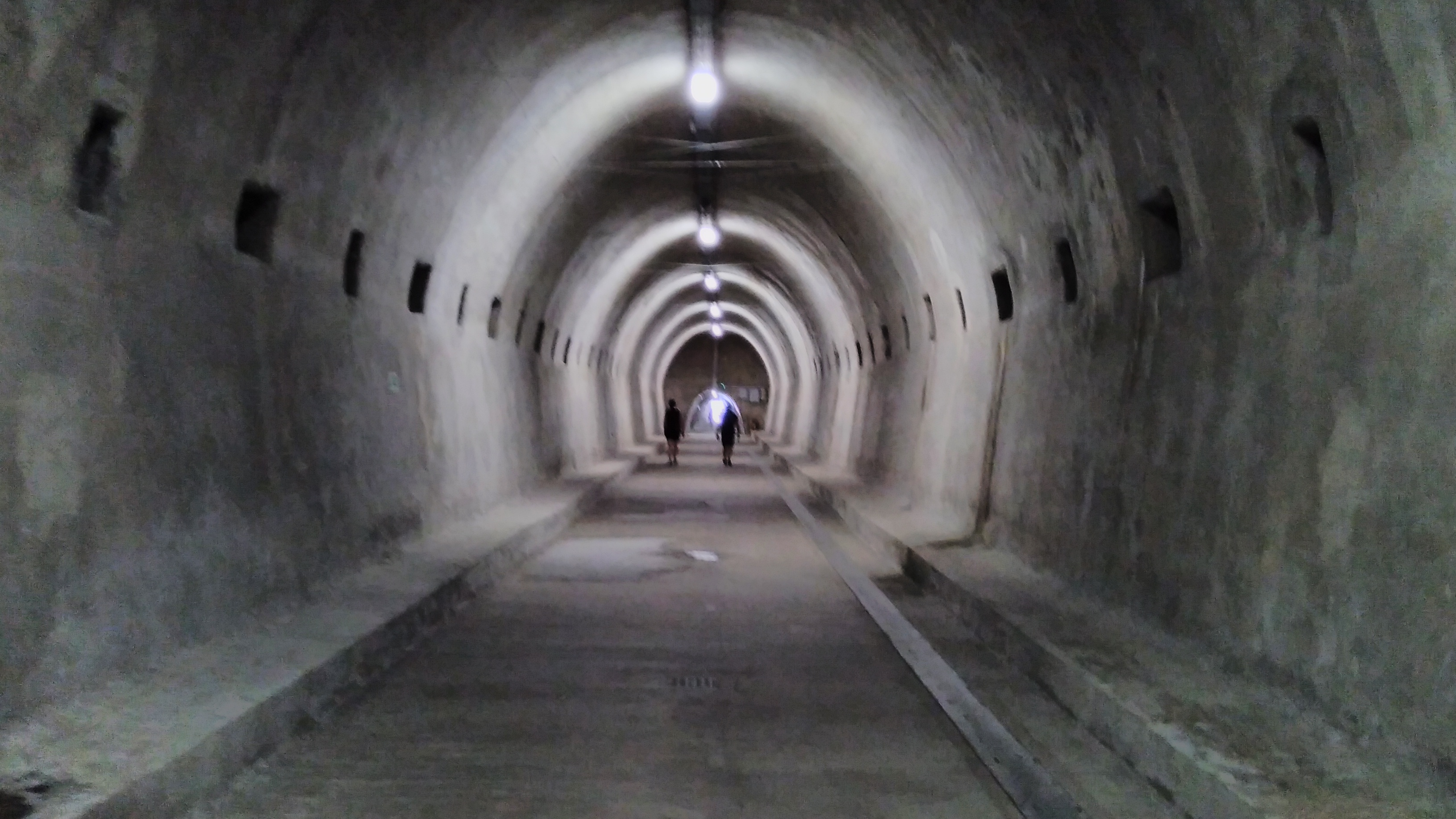 Tunel Grič i centrala Zagreb.